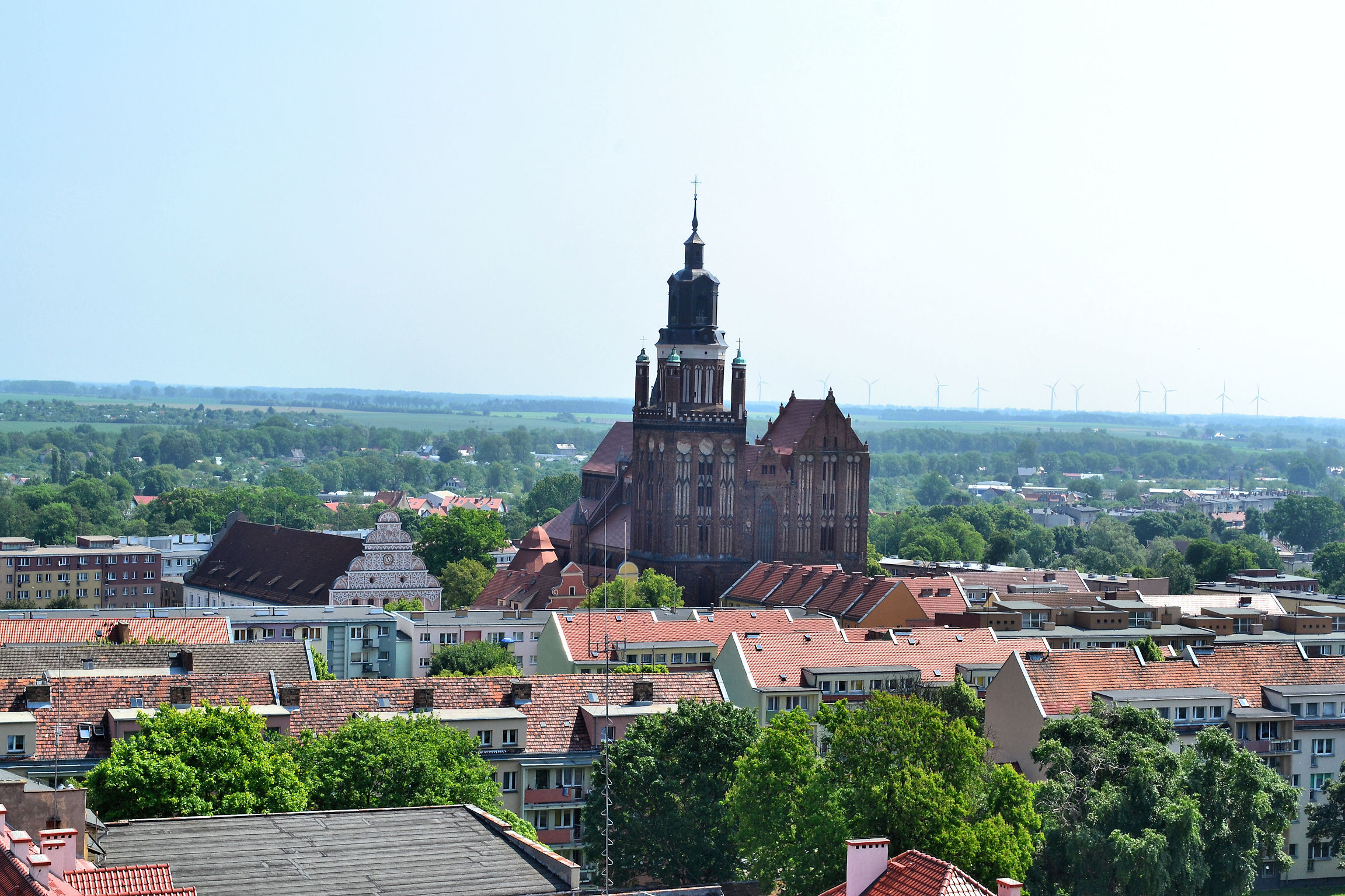 Widok z Baszty Morze Czerwone w Stargardzie Szczecińskim